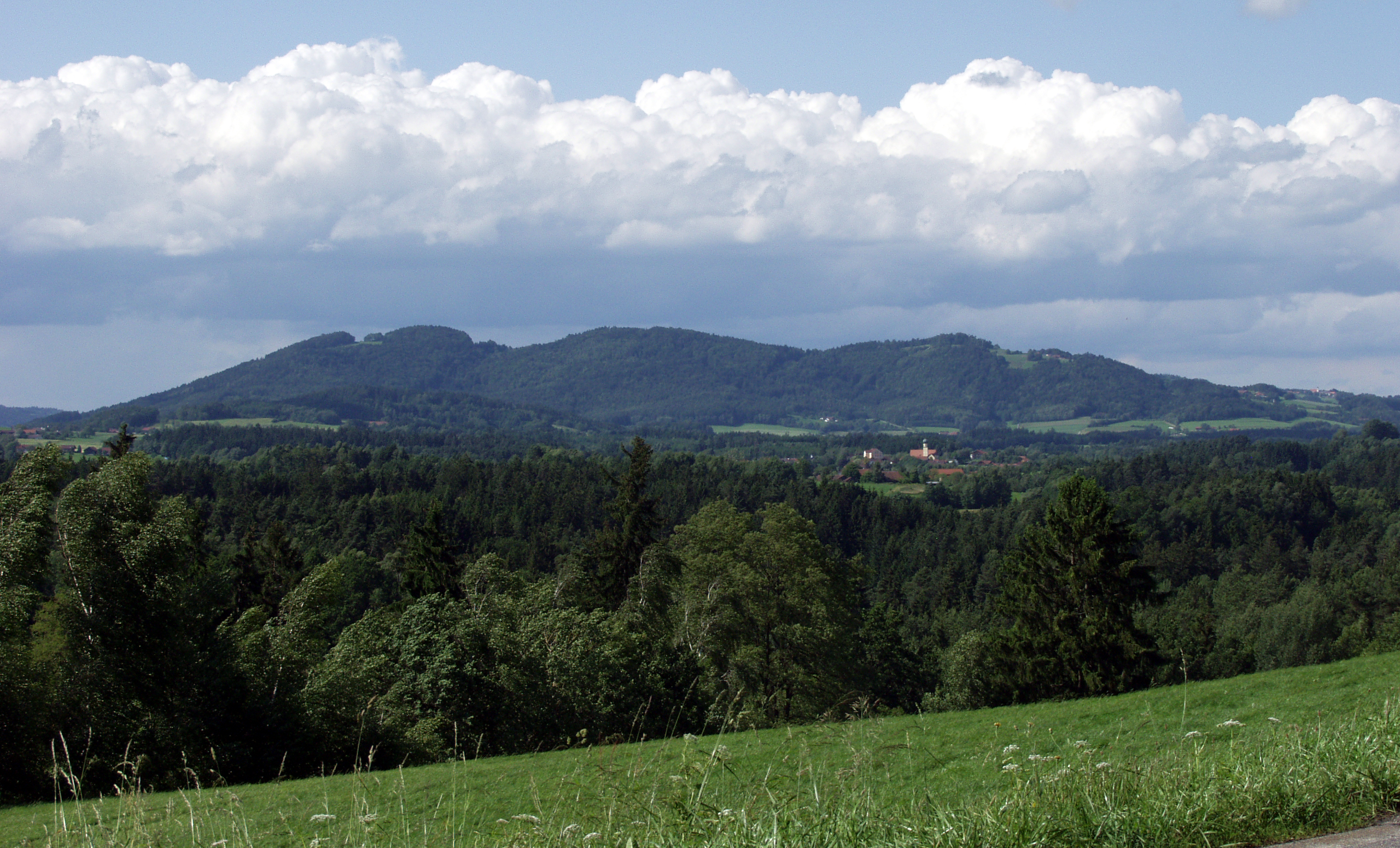 Gallner von Hinterbuchberg (Mitterfels) aus gesehen